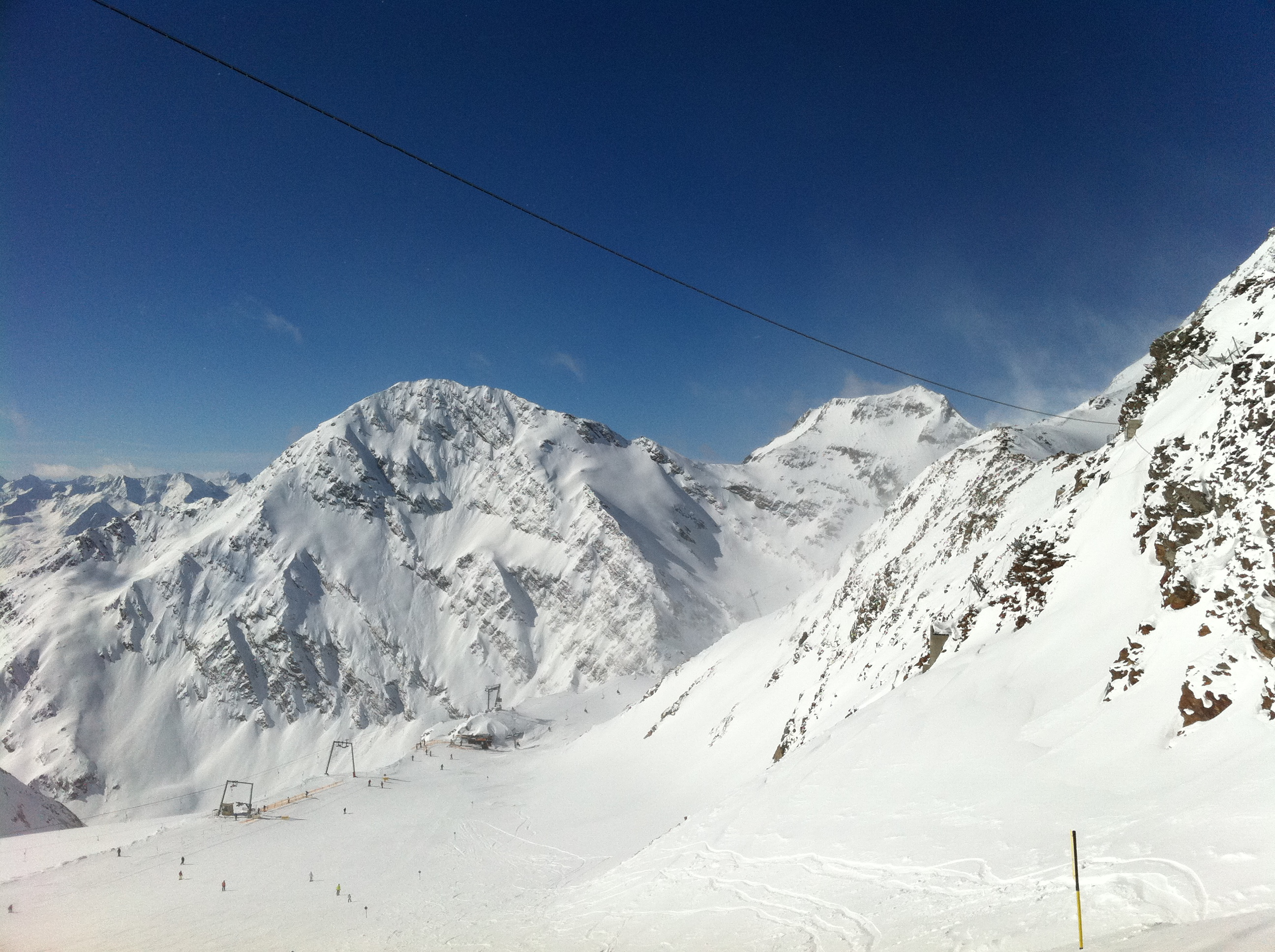 Stubai Galcier